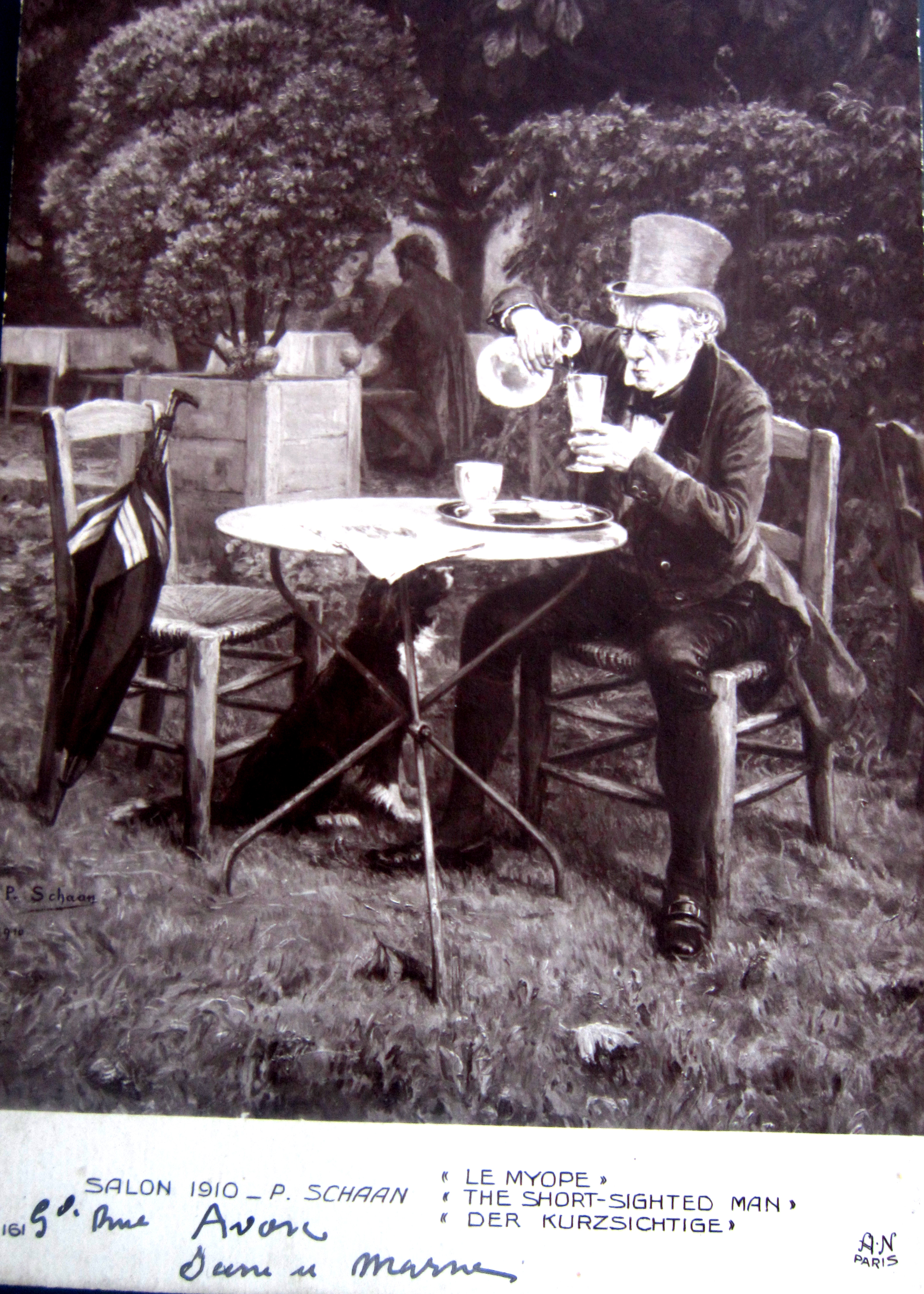 Paul Schaan ː Le myope - Salon de Paris - 1910